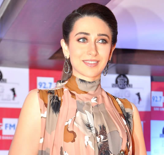 Karisma Kapoor at 92.7 BIG FM studio